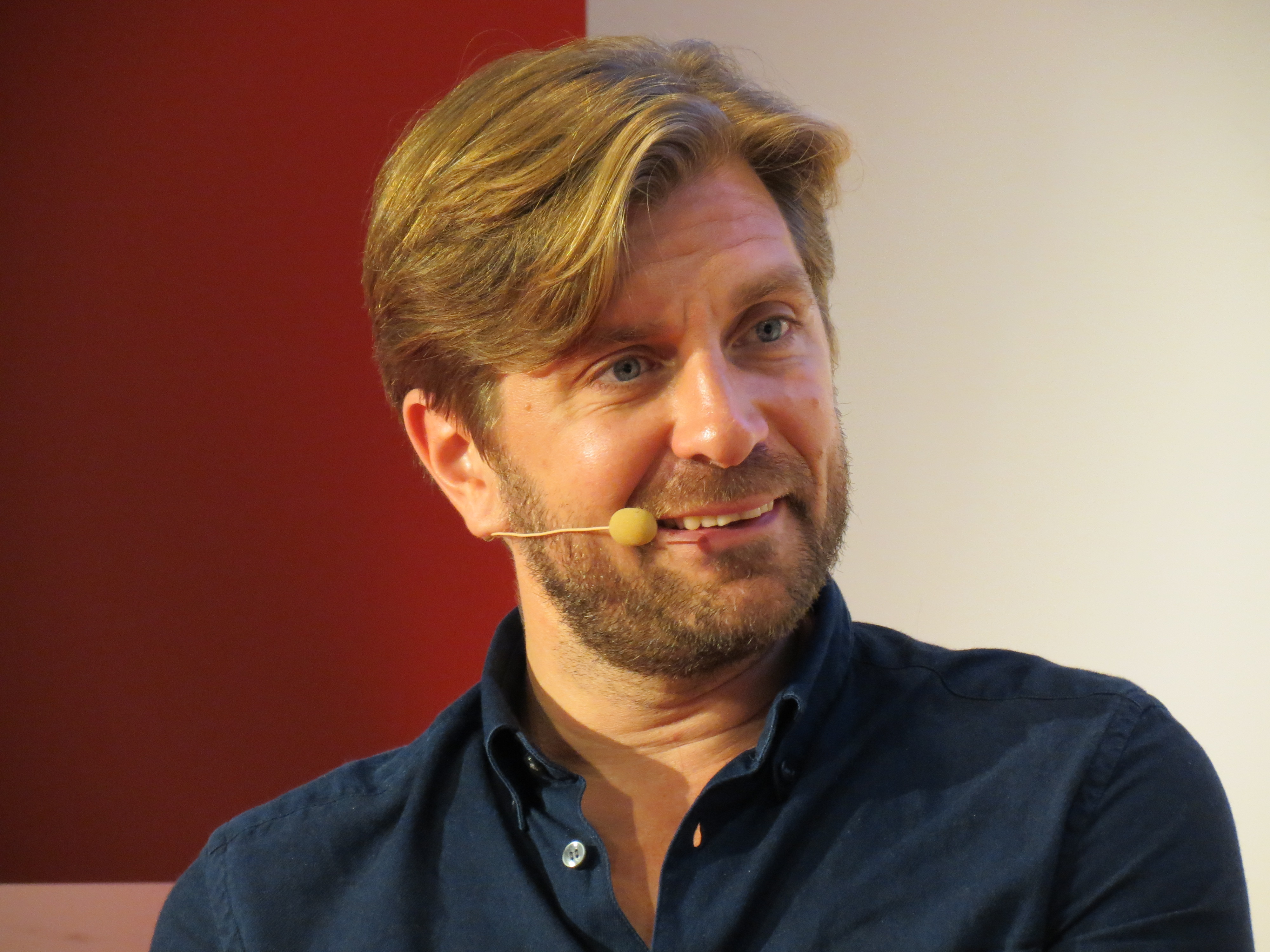 Ruben Östlund på Bokmässan i Göteborg 2017.